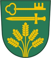 Unín (znak)